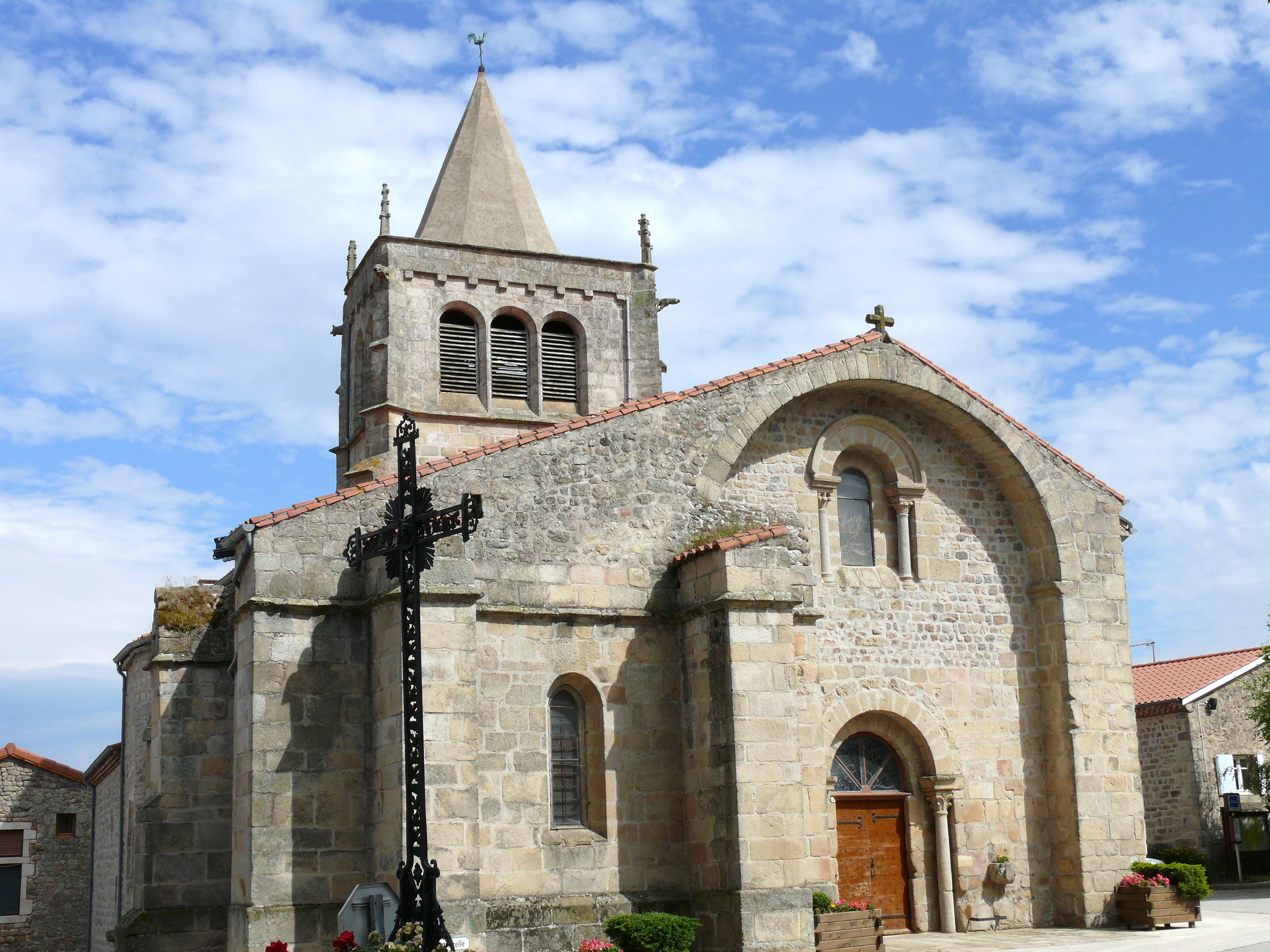 Saint-Nizier-de-Fornas - Eglise Saint-Nizier